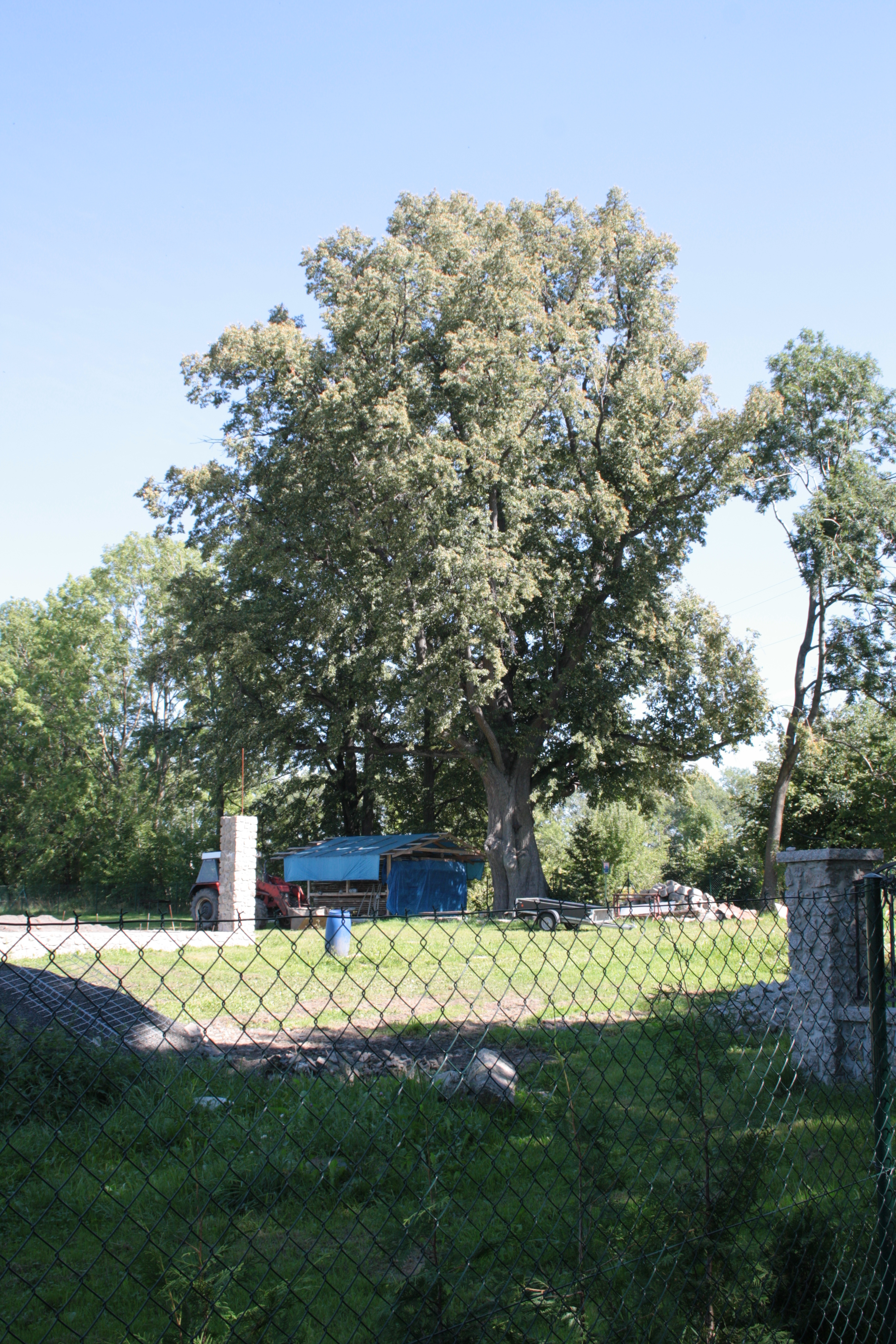 This photograph was taken with a DSLR from WMCZ's Camera grant. Horákova lípa v Ludvíkově pod Smrkem.